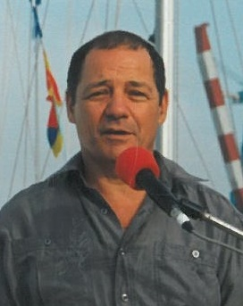 תא"ל יפתח ספקטור מברך בעת השקת ספינת האימונים 'ארי הים' כשם הספינה שבה מצאו כ"ג יורדי הסירה את מותם